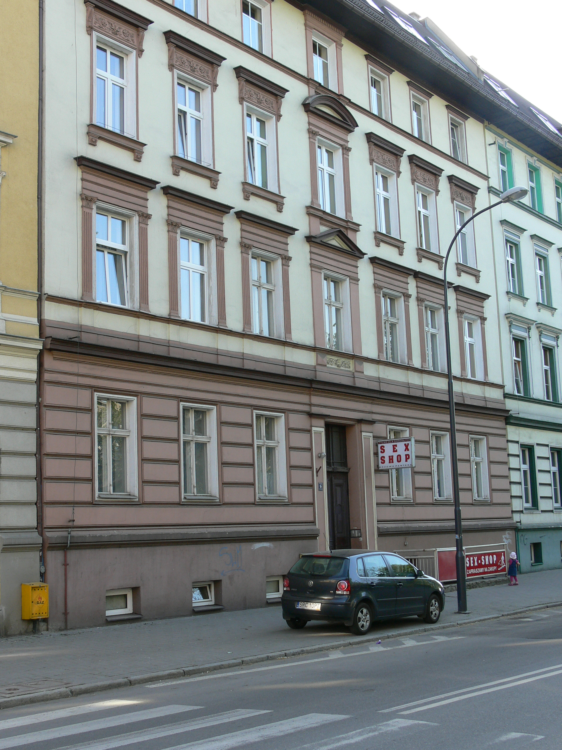 Racibórz - kamienica przy ul. Staszica 15